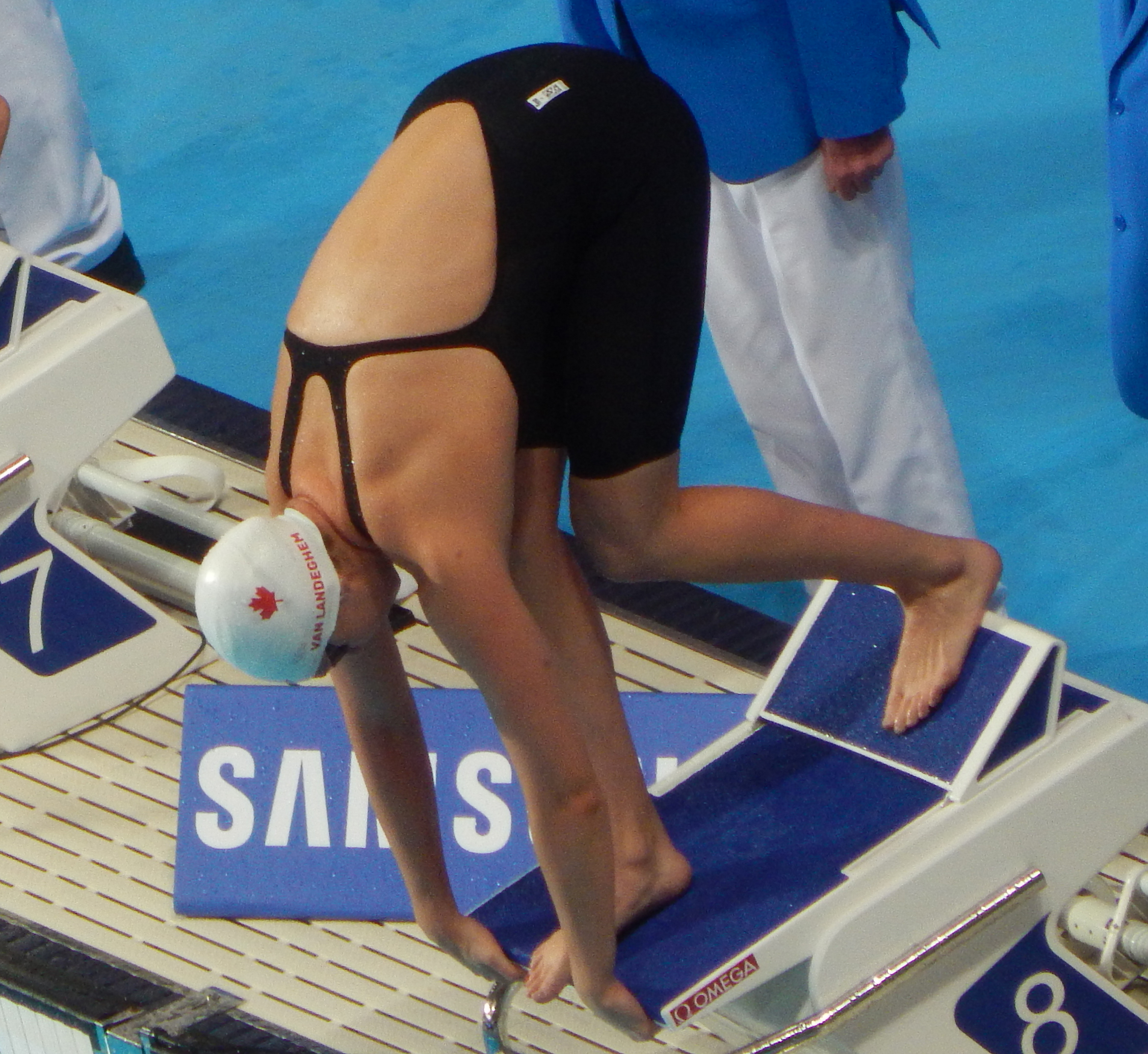 Шанталь ван Ландегем в финале 50 метровки вольным стилем в Казани на чемпионате мира